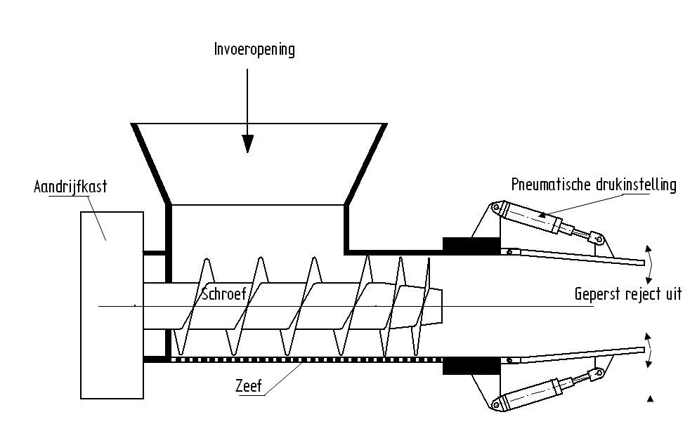 Principeschema van een schroefpers